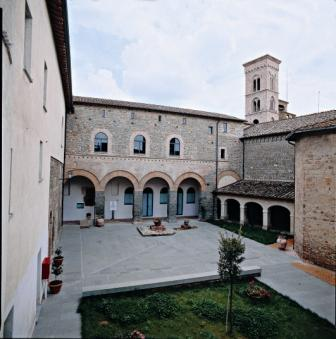 Chiostro dell'ex convento di San Francesco a Deruta ora parte del Museo regionale della ceramica